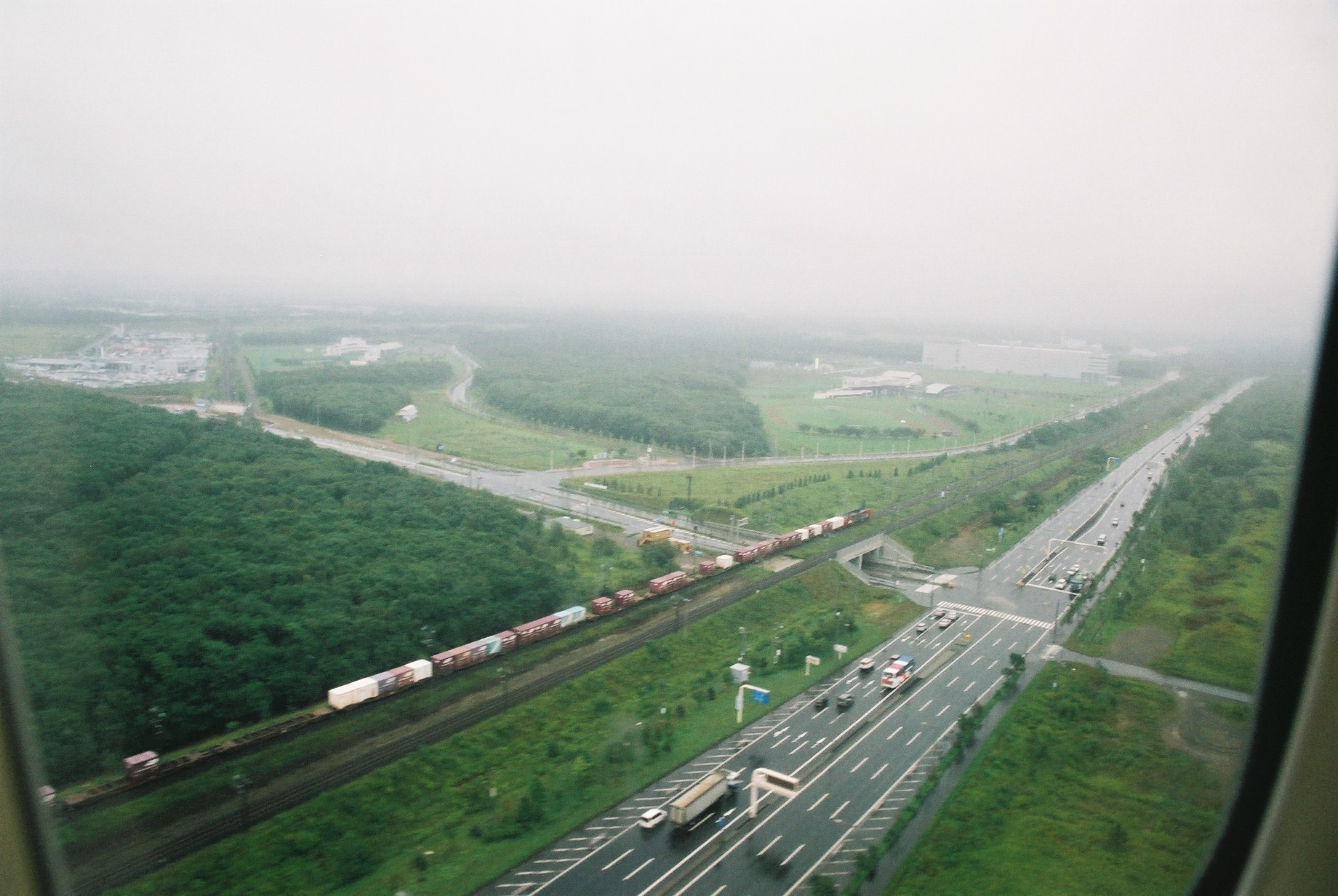 JR千歳線と国道36号線(室蘭街道)。 まもなく新千歳空港に着陸です。 (2006/09/10 In Flight, NH51, JAPAN)